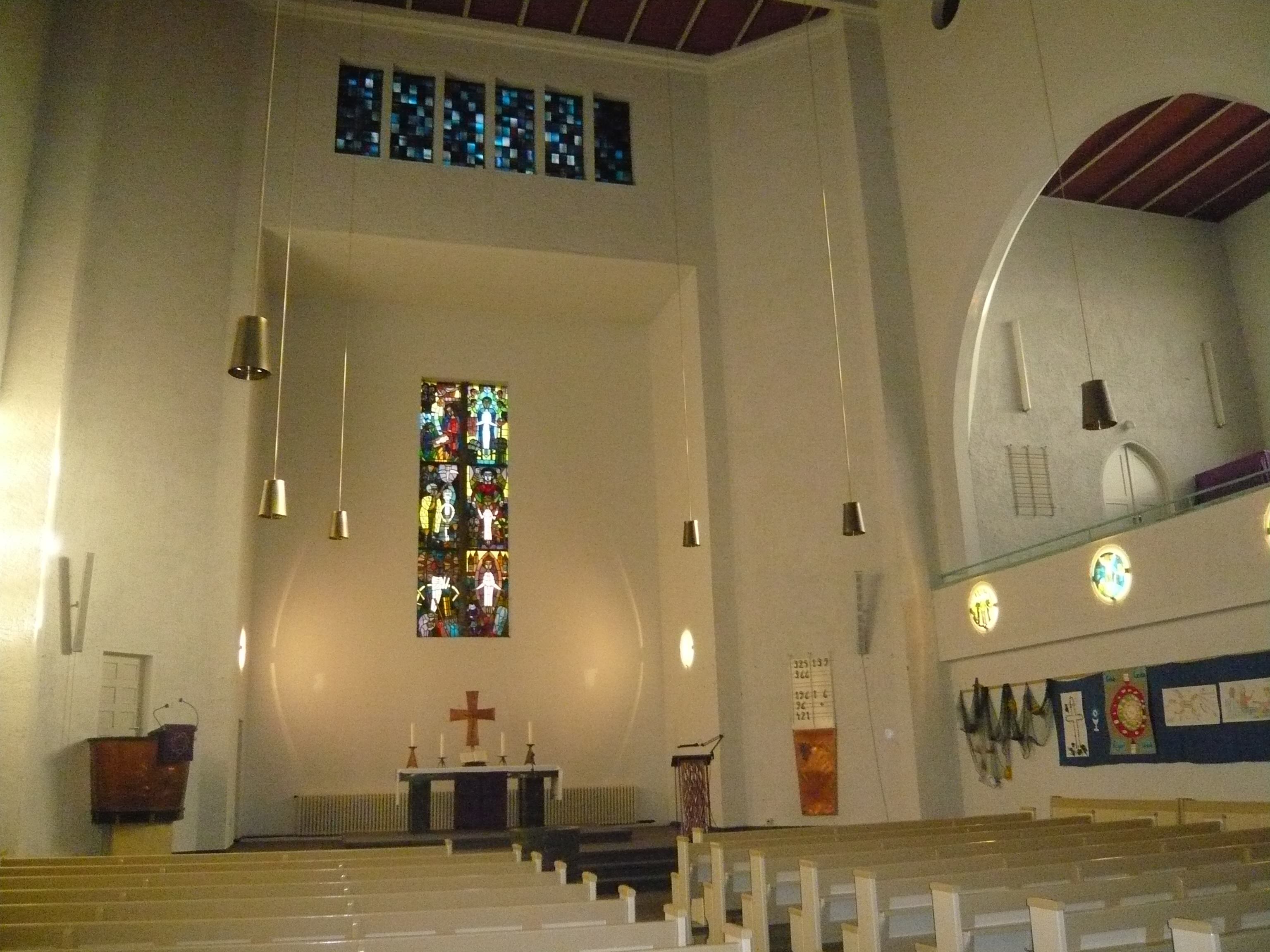 Erlöserkirche Berlin-Moabit